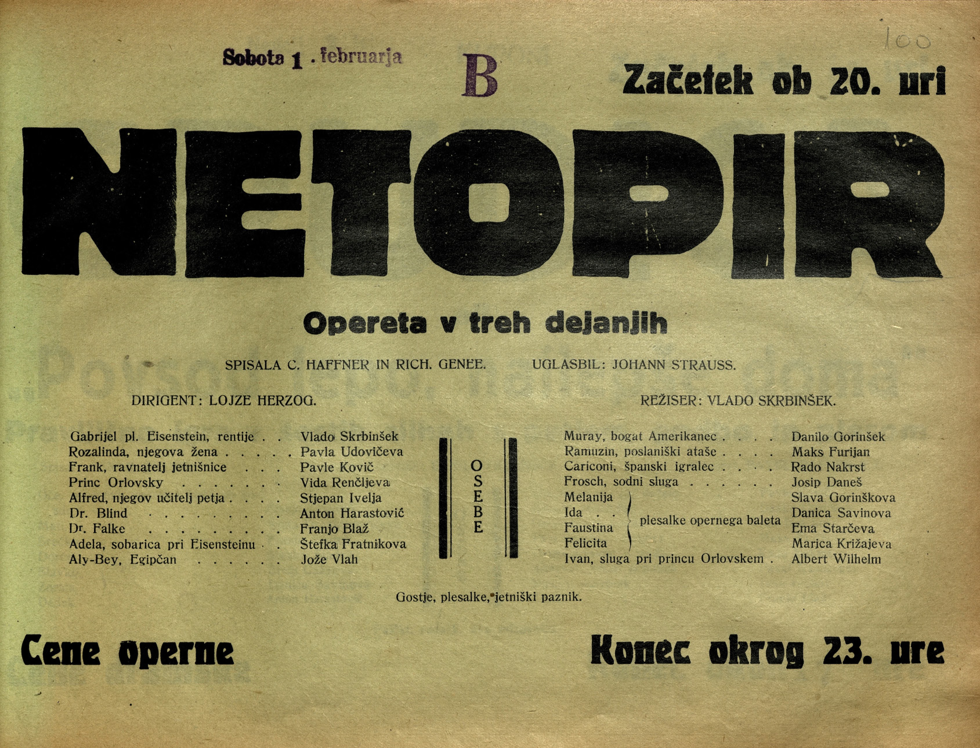 Plakat za predstavo Netopir v Narodnem gledališču v Mariboru.